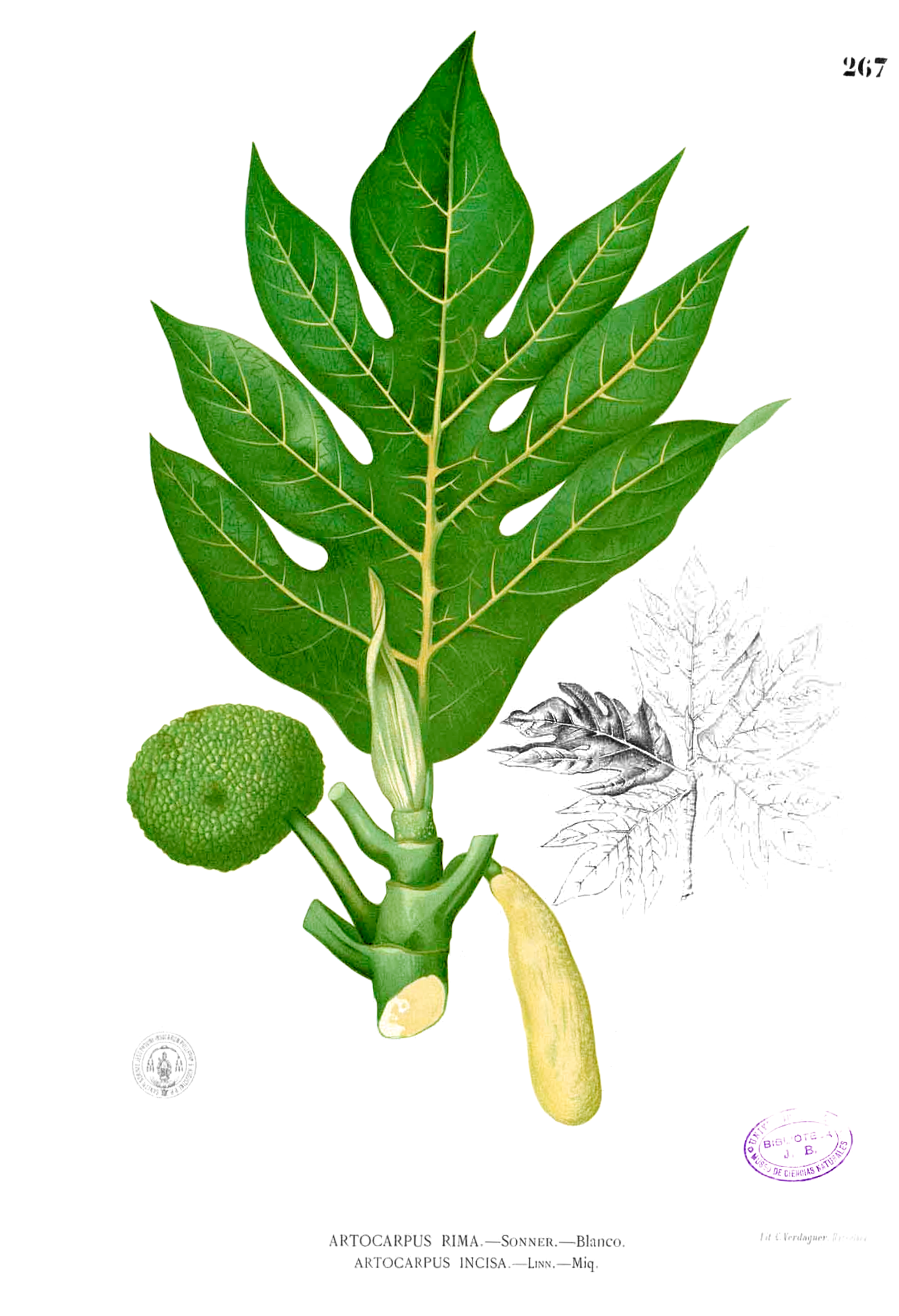 Artocarpus incisa Blanco (inside Artocarpus altilis species)